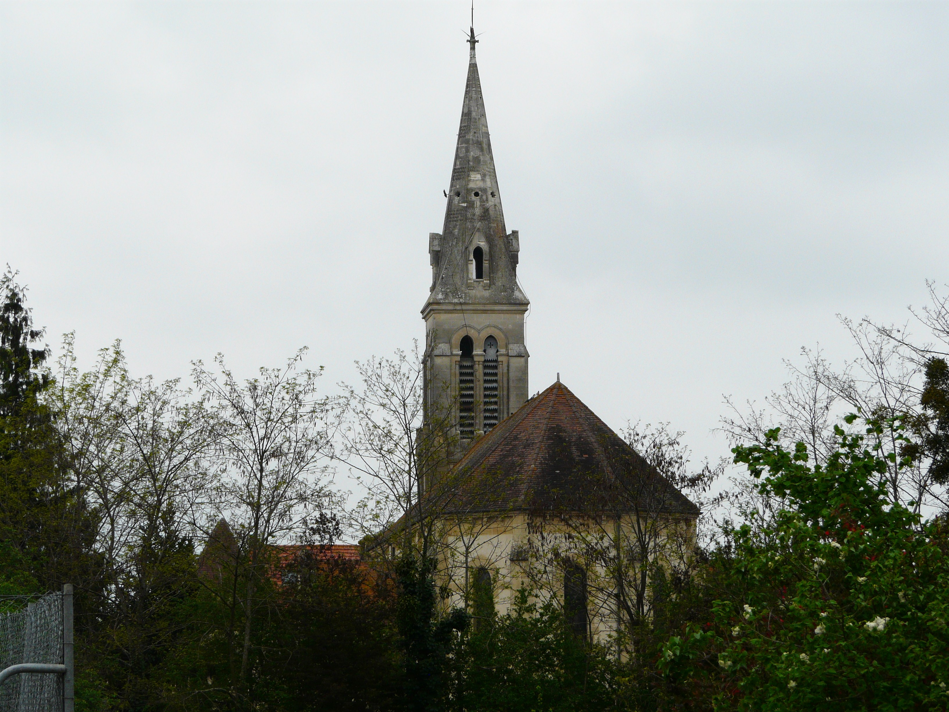 Le chevet de l'église Saint-Victor, La Force, Dordogne, France.